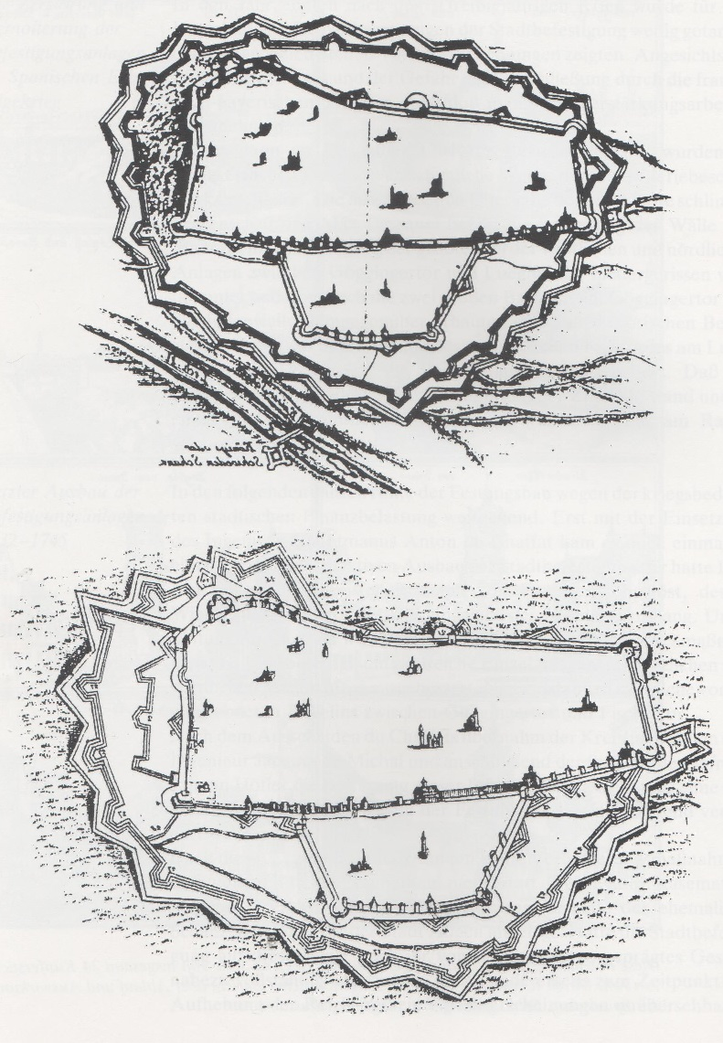 Planung der Schweden zur Aufrüstung Augsburgs aus den Jahren 1632-1645